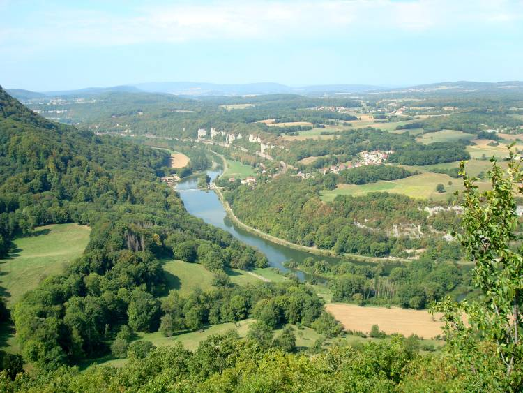 Vue de la vallée du Doubs depuis le Mont Dommage au dessus de Silley-Bléfond-Doubs